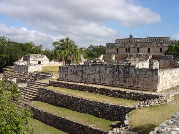 Kabah